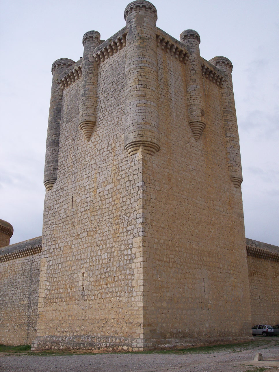 Castillo de Torrelobatón, Torre del Homenaje / Castle of Torrelobatón, Tower of Tribute